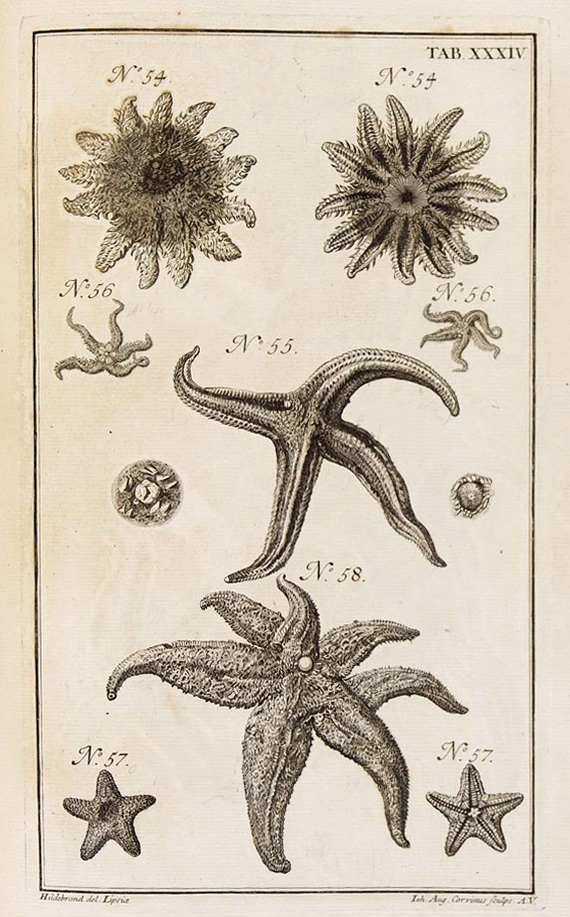 Eine Seite aus Johann Heinrich Linck d.Ä. De stellis marinis liber singularis